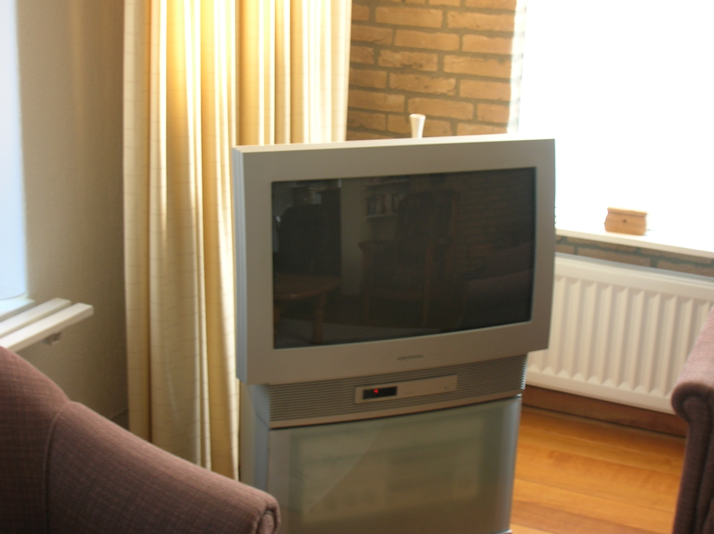 Zelfgemaakte foto, 11 juli 2006: Een analoog breedbeeld televisietoestel.